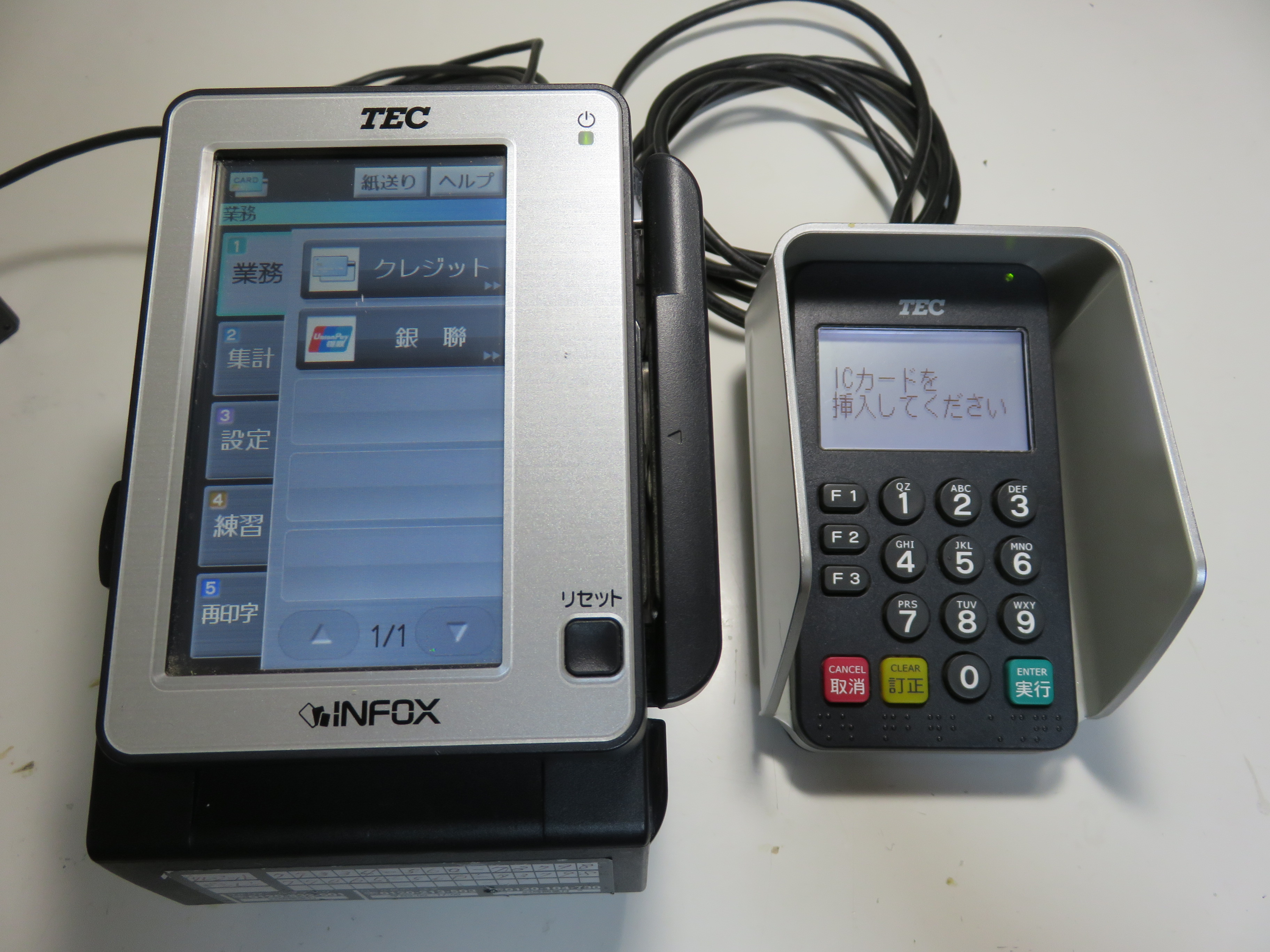 INFOXで使用されている、東芝TECのCT4100端末。自宅にて撮影